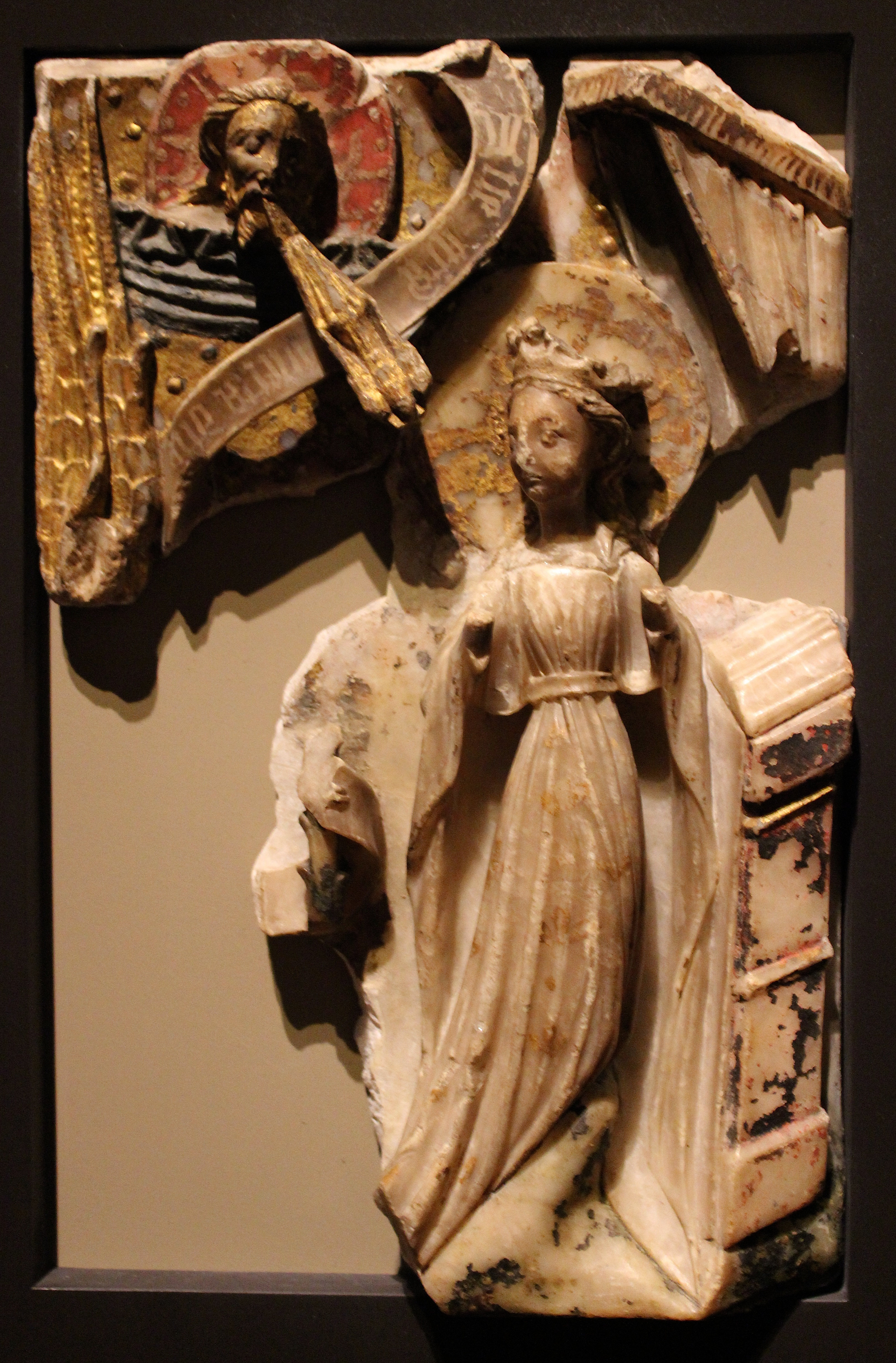 Madrid, M.A.N. Alabastro inglés con la Anunciación, ss. XIV-XV.